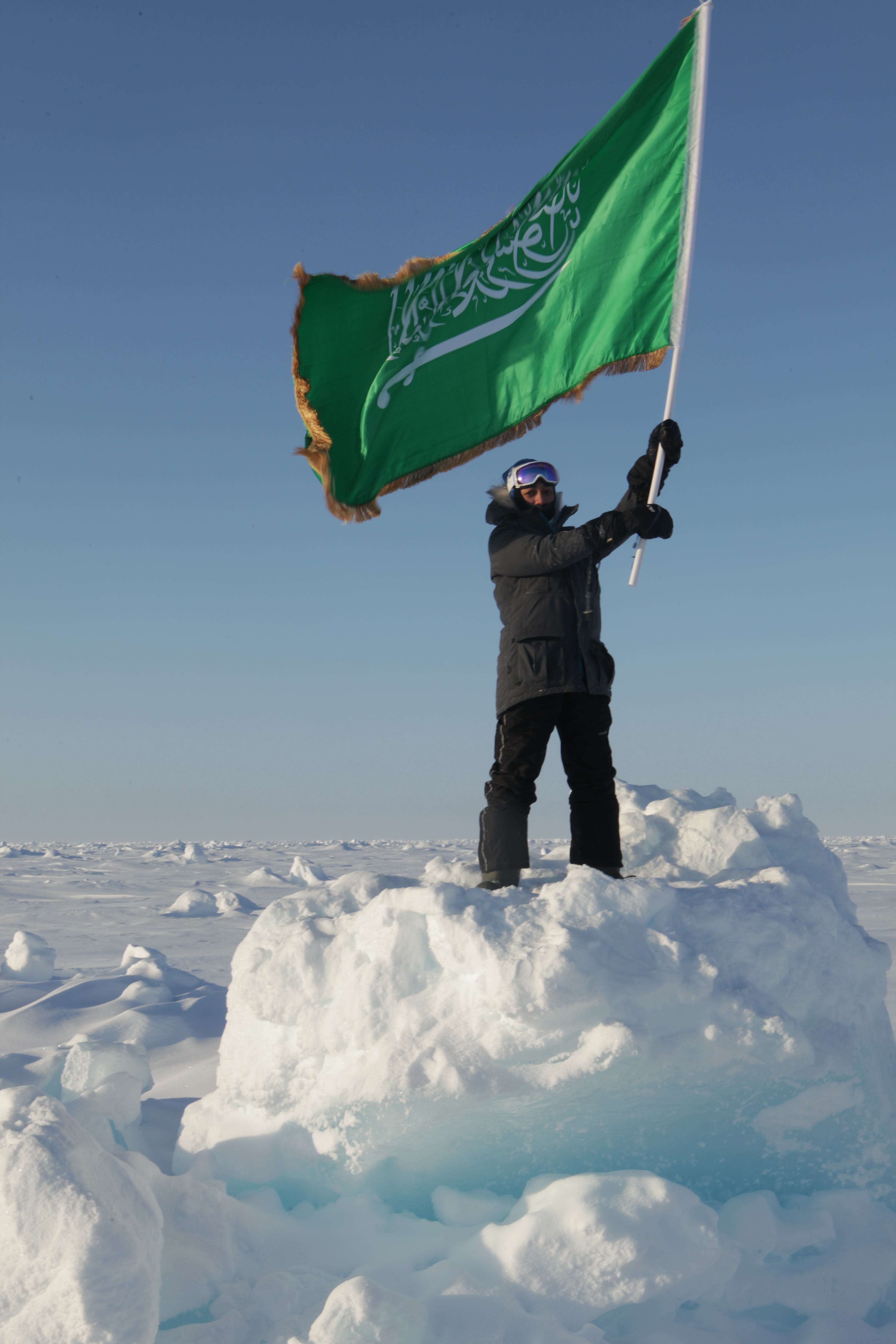 mariam